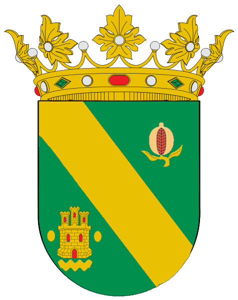 Escudo cuadrilongo con base circular. De sinople, una banda de oro acompañada en lo alto de una granada tallada y hojada de oro, y rajada de gules; en lo bajo, de castillo de oro, donjonado de uno, mazonado de sable y aclarado de gules, flanqueado por dos óvalos de oro. Bajo el castillo una onda recortada, de oro, en posición de faja. Al timbre, Corona Real abierta.